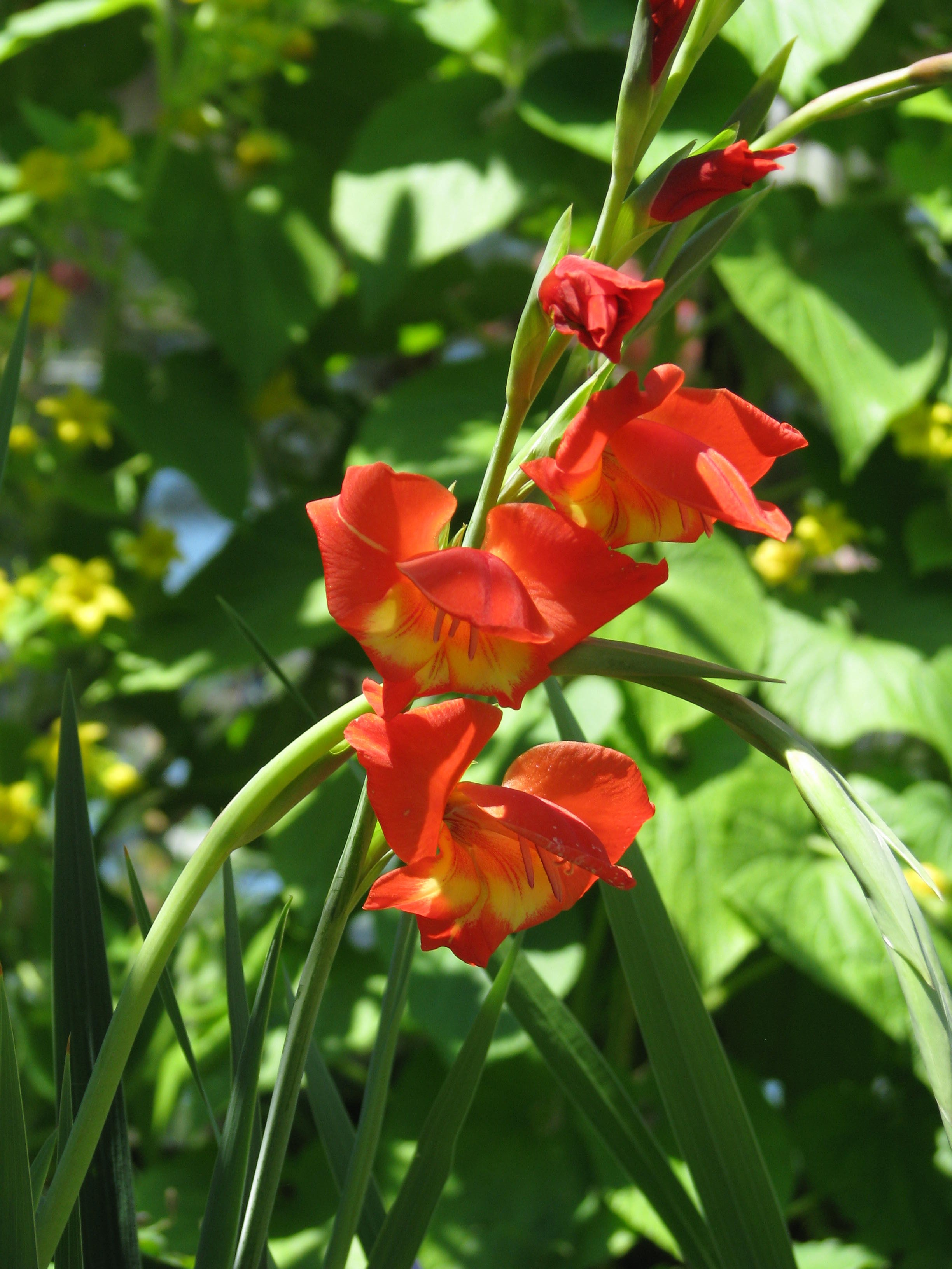 Gladiolus garnieri